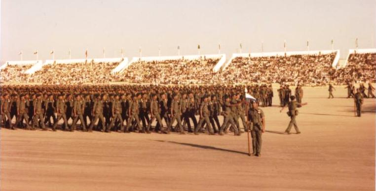 Northern Frontier Regiment